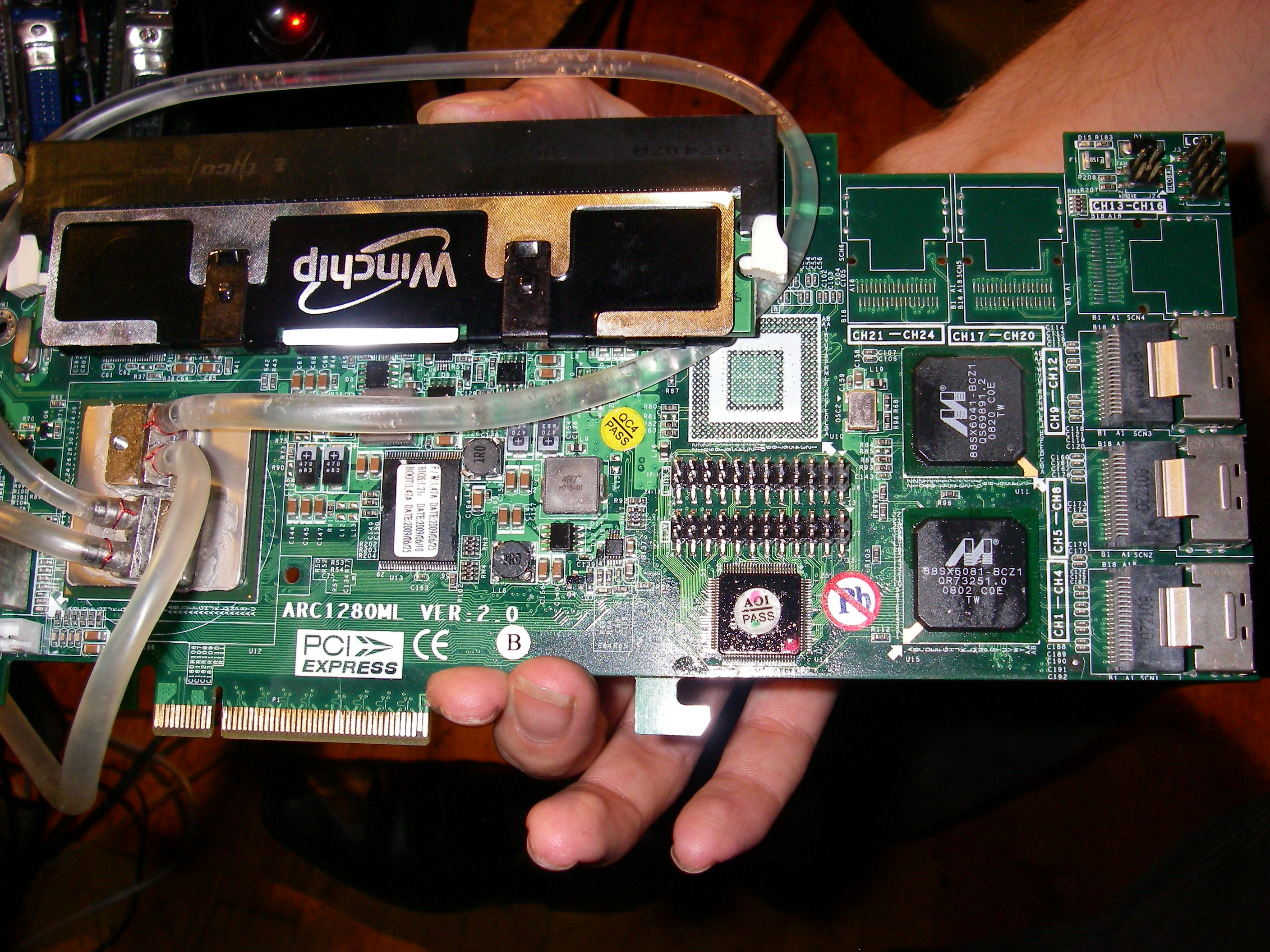 Un contrôleur RAID Areca 1231 ML rev 2.0 modifié avec une barrette de 4 Go (capacité maximum reconnue par le processeur Intel intégré)